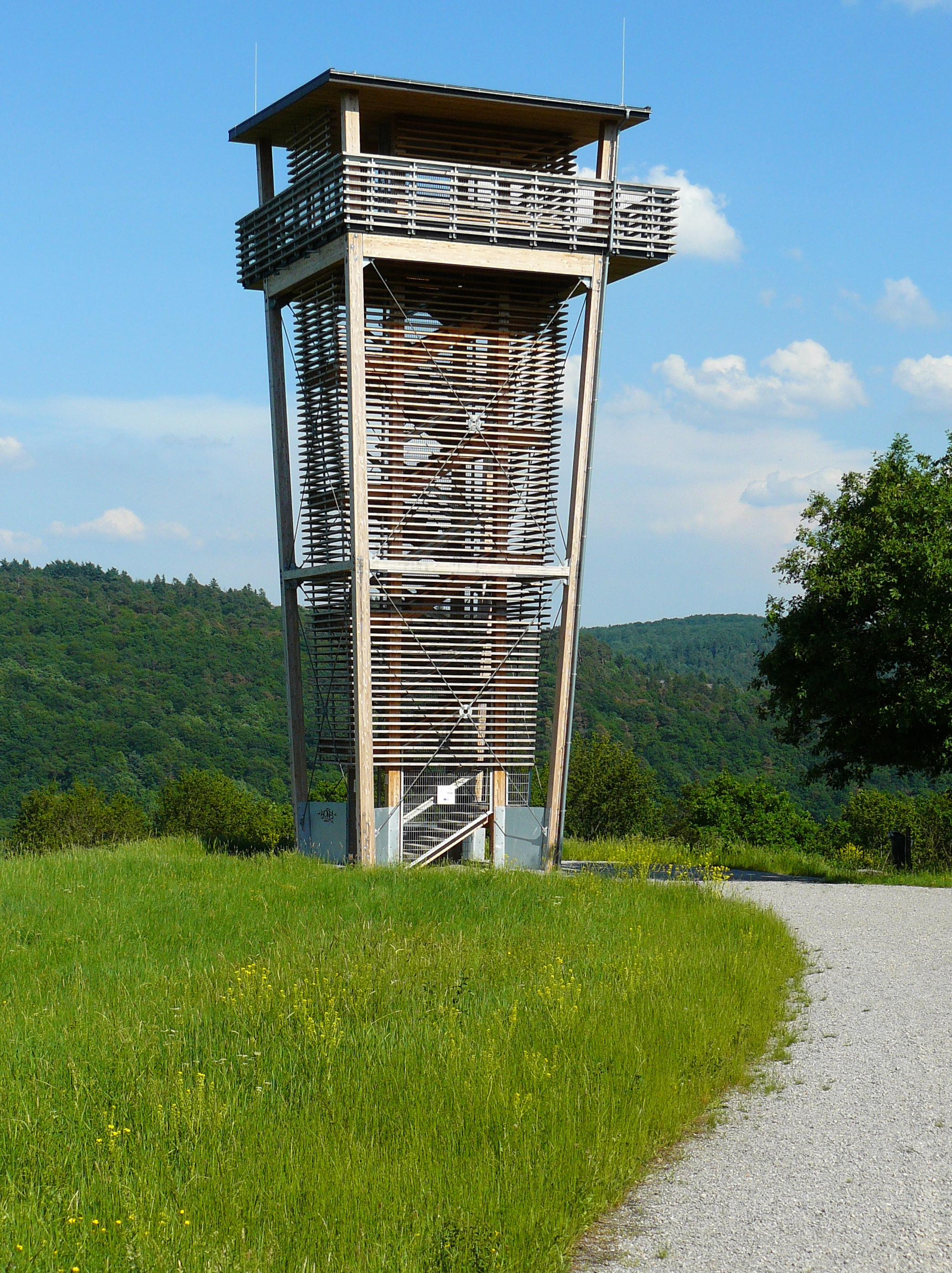 Dillblick-Turm bei Herborn